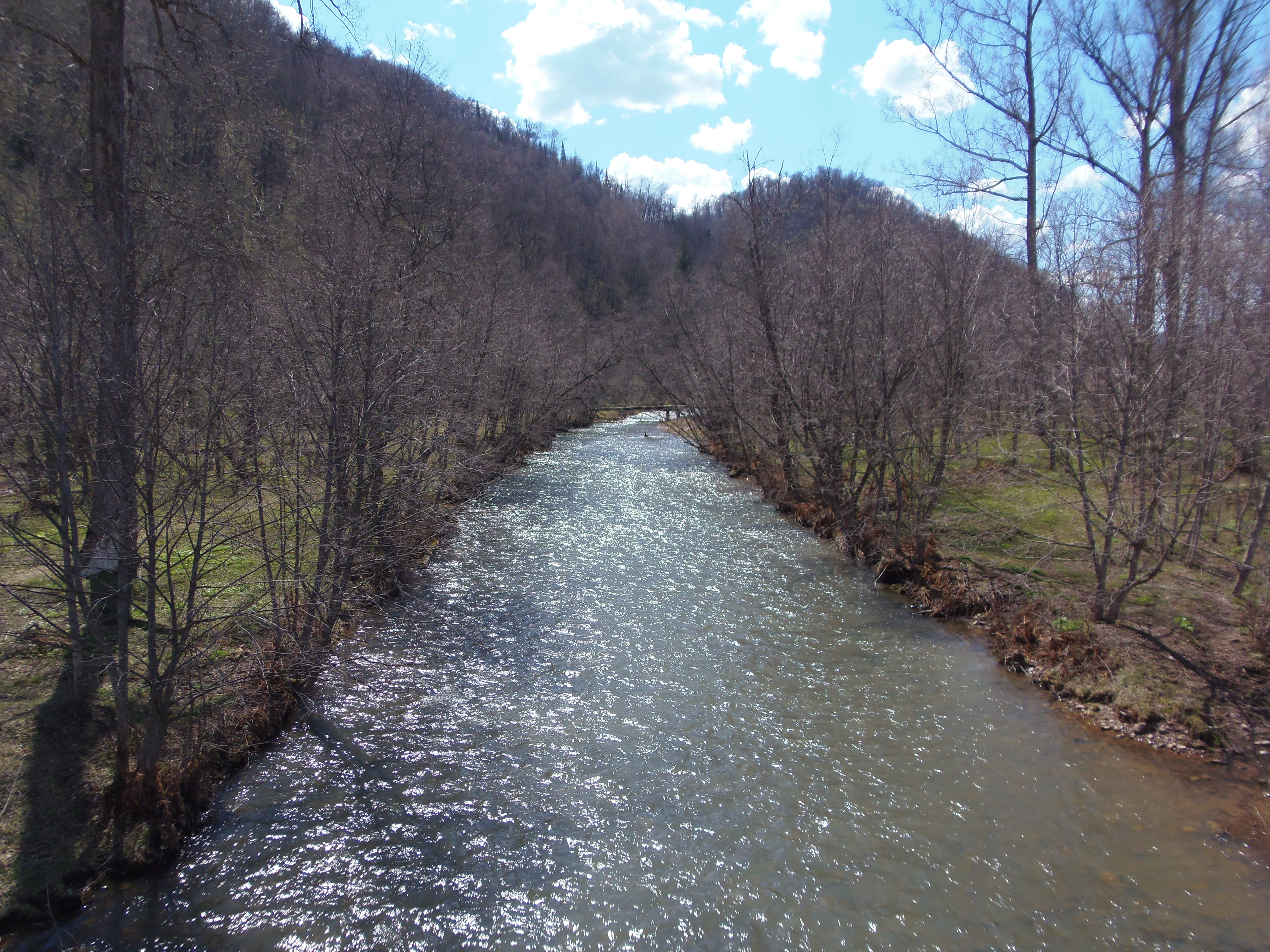 Йөйәк йылғаһы (Зуячка). Белорет районы. Башҡортостан